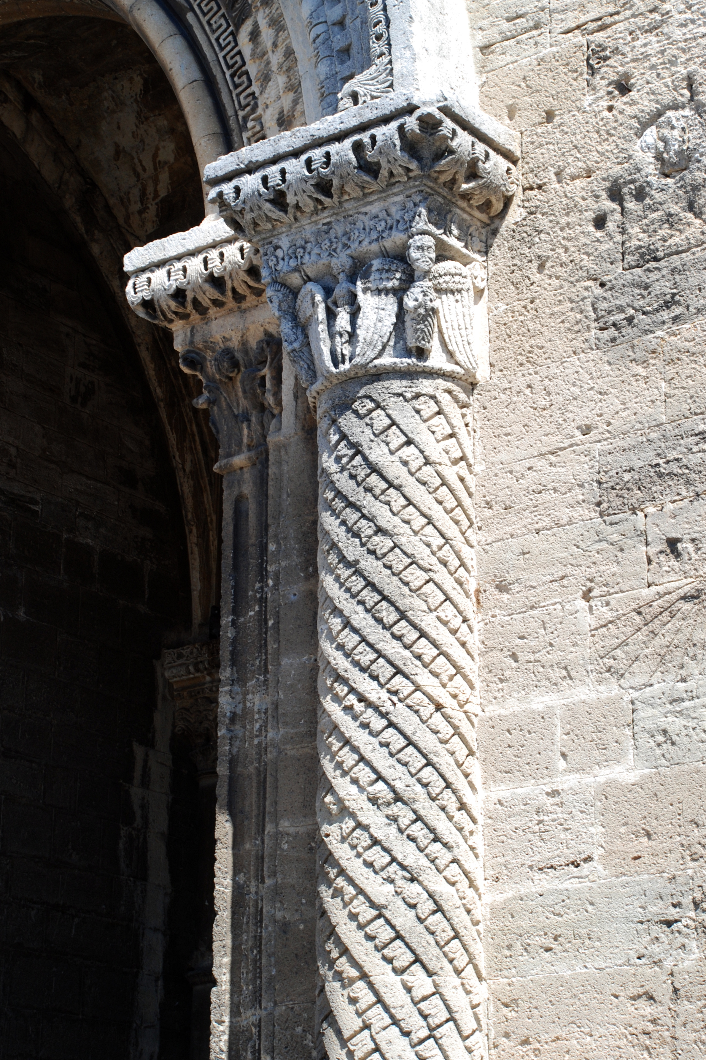 France - Vaucluse - Le Thor - Église Notre-Dame-du-Lac